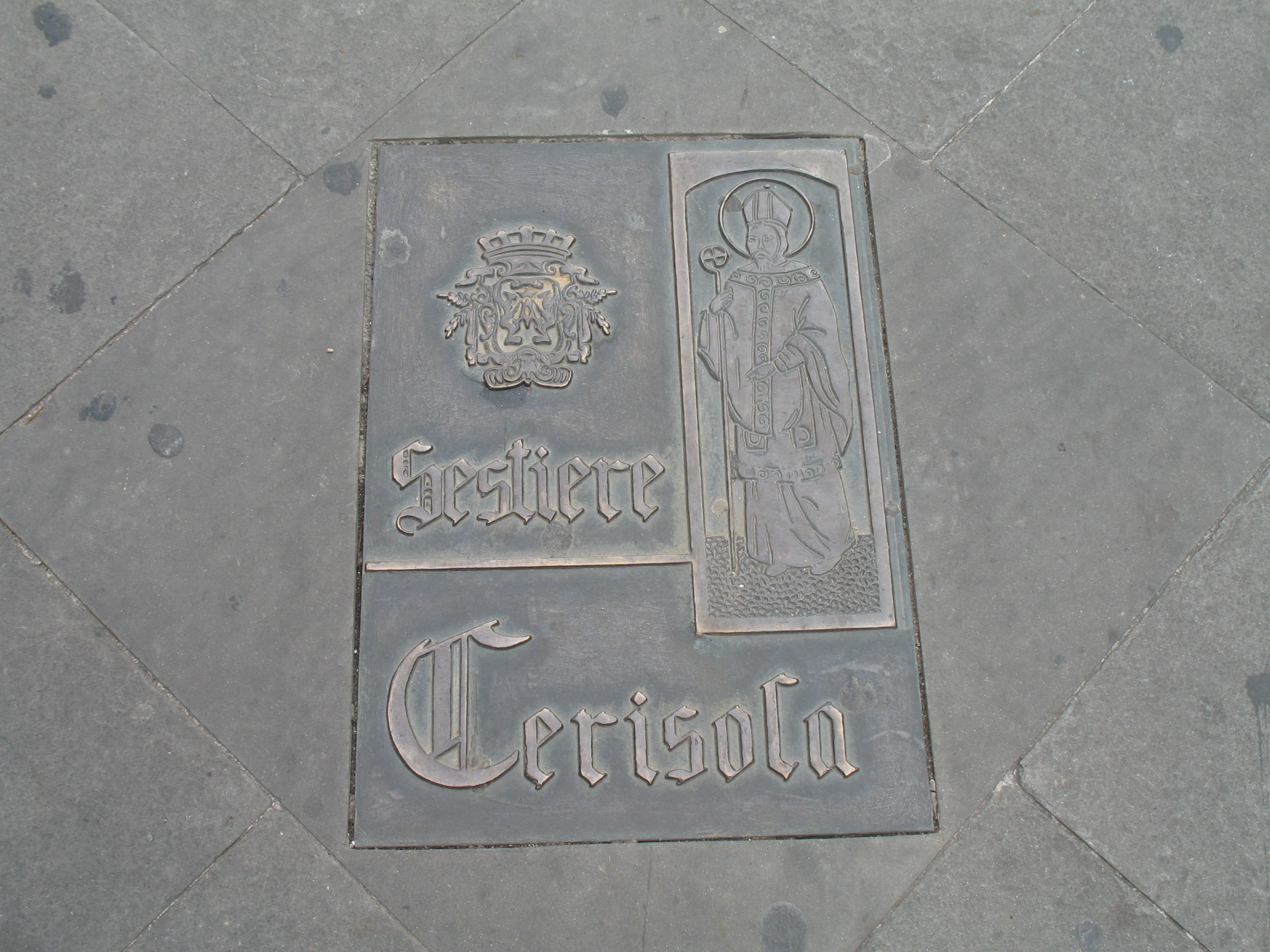 Serie di Immagini da Rapallo e San Michele di Pagana (Rapallo), in provincia di Genova